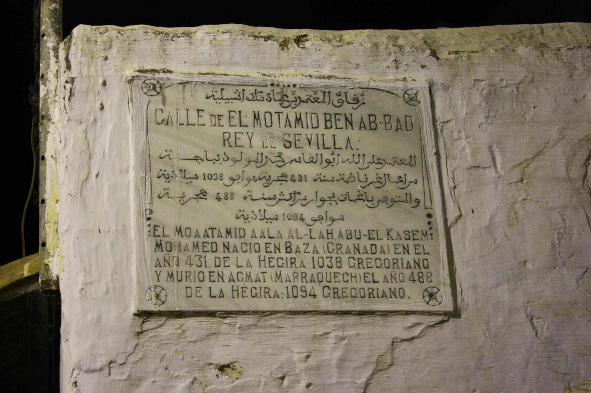 Calle de El Motamid Ben Ab-Bad, rey de Sevilla, en la Medina de Larache